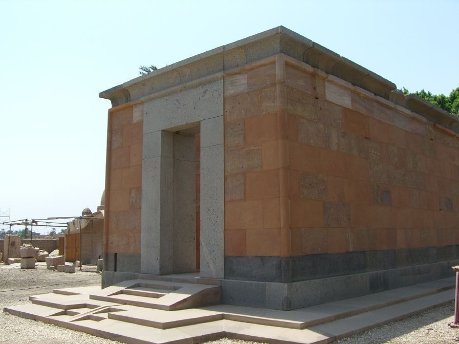 Vue de l'arrière de la "chapelle rouge" d'Hatchepsout à Karnak - XVIIIe dynastie égyptienne